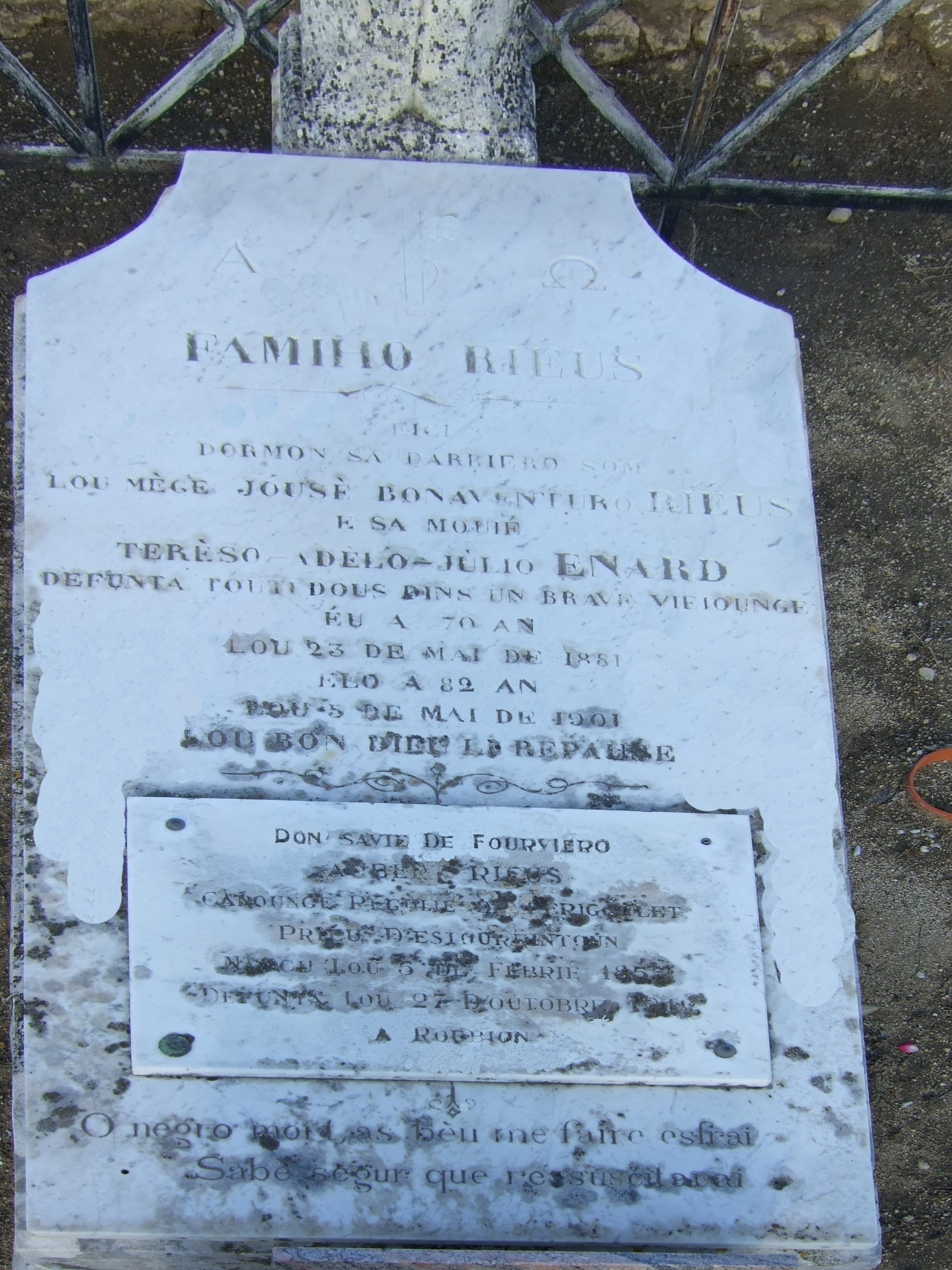 Tombe du RP Xavier de Fourvière dans le cimetière de Robion ( Vaucluse )